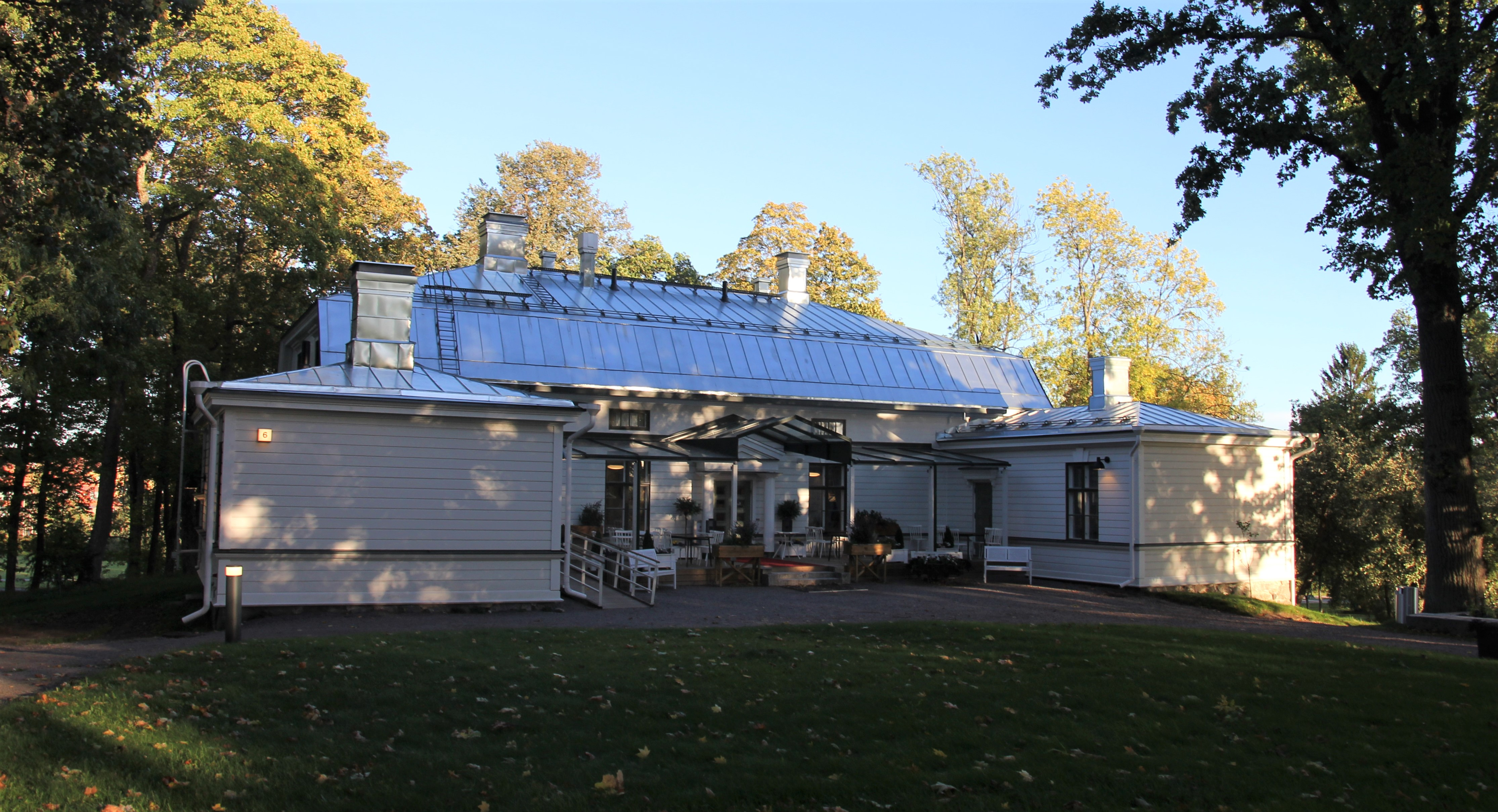 Backaksen kartanon päärakennus, Ylästöntie 28, Vantaan Pakkalan kaupunginosassa. Backaksen kartanon päärakennuksen runko on vuodelta 1818 ja siipirakennukset vuodelta 1844. Vuonna 1926 suoritettiin perusteellinen korjaus arkkitehti Väinö Vähäkallion ohjeiden mukaan.